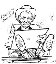 Self-portrait (caricature)